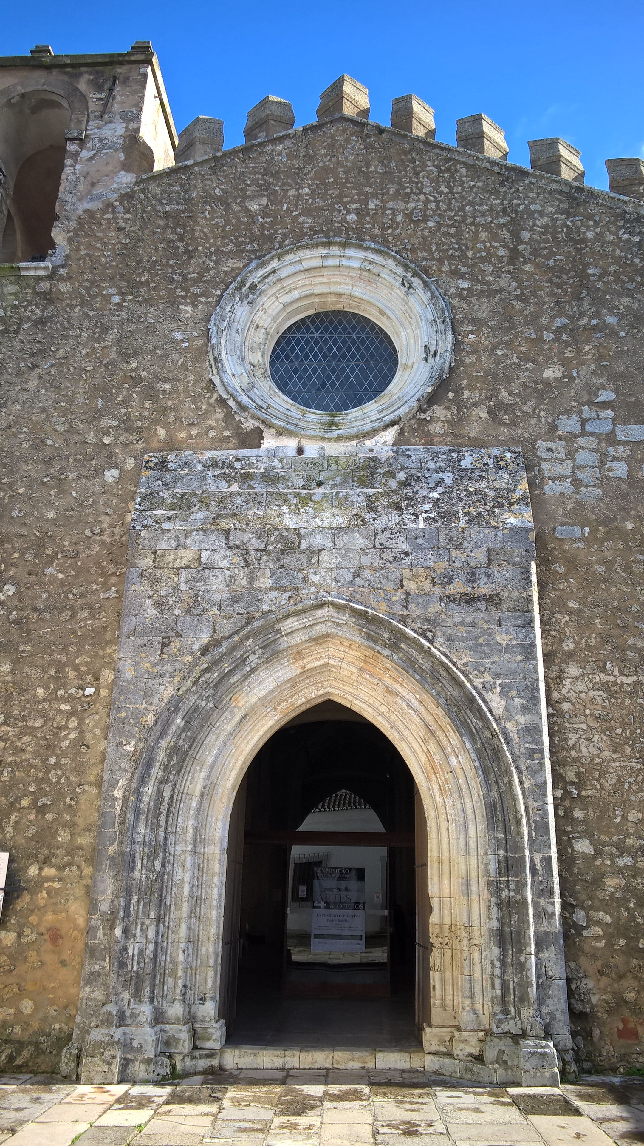 Igreja de Santiago, do Convento de Santiago, no Castelo de Palmela, pórtico e rosácea góticos na fachada leste.